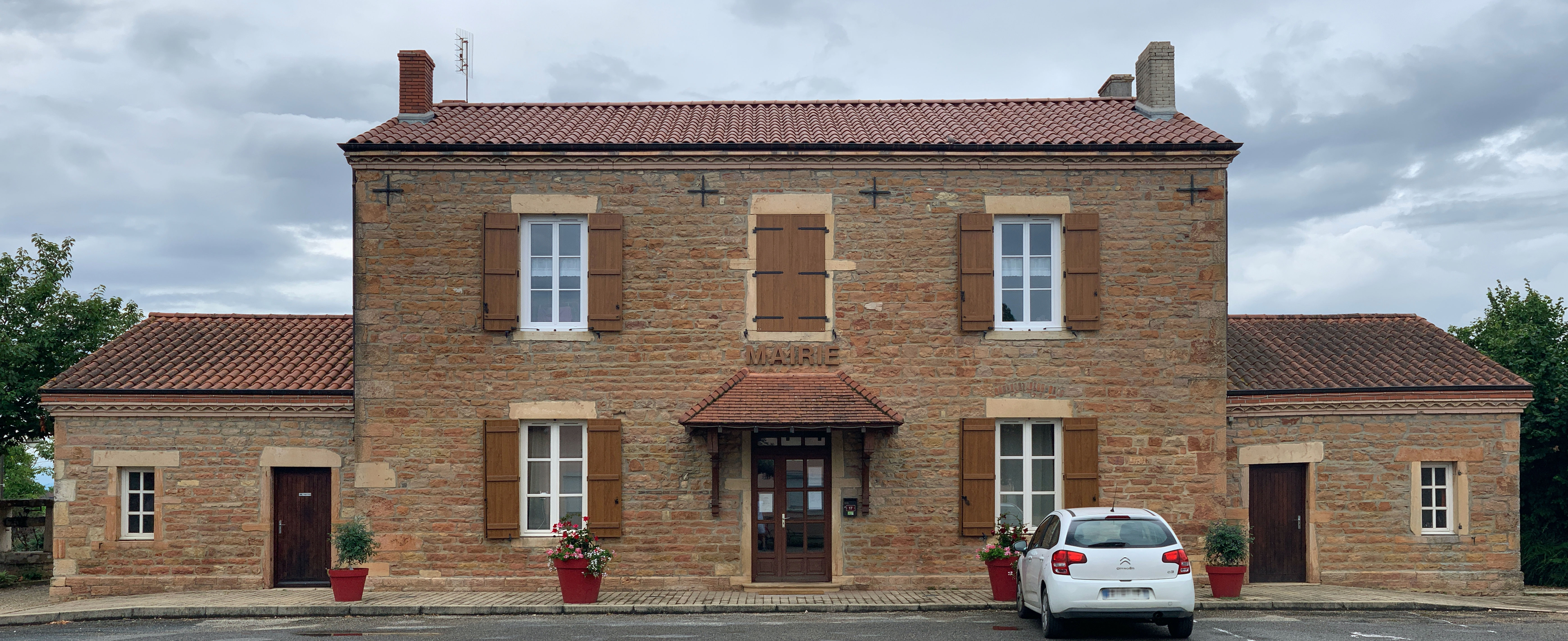 Mairie de Saint-Genis-sur-Menthon.